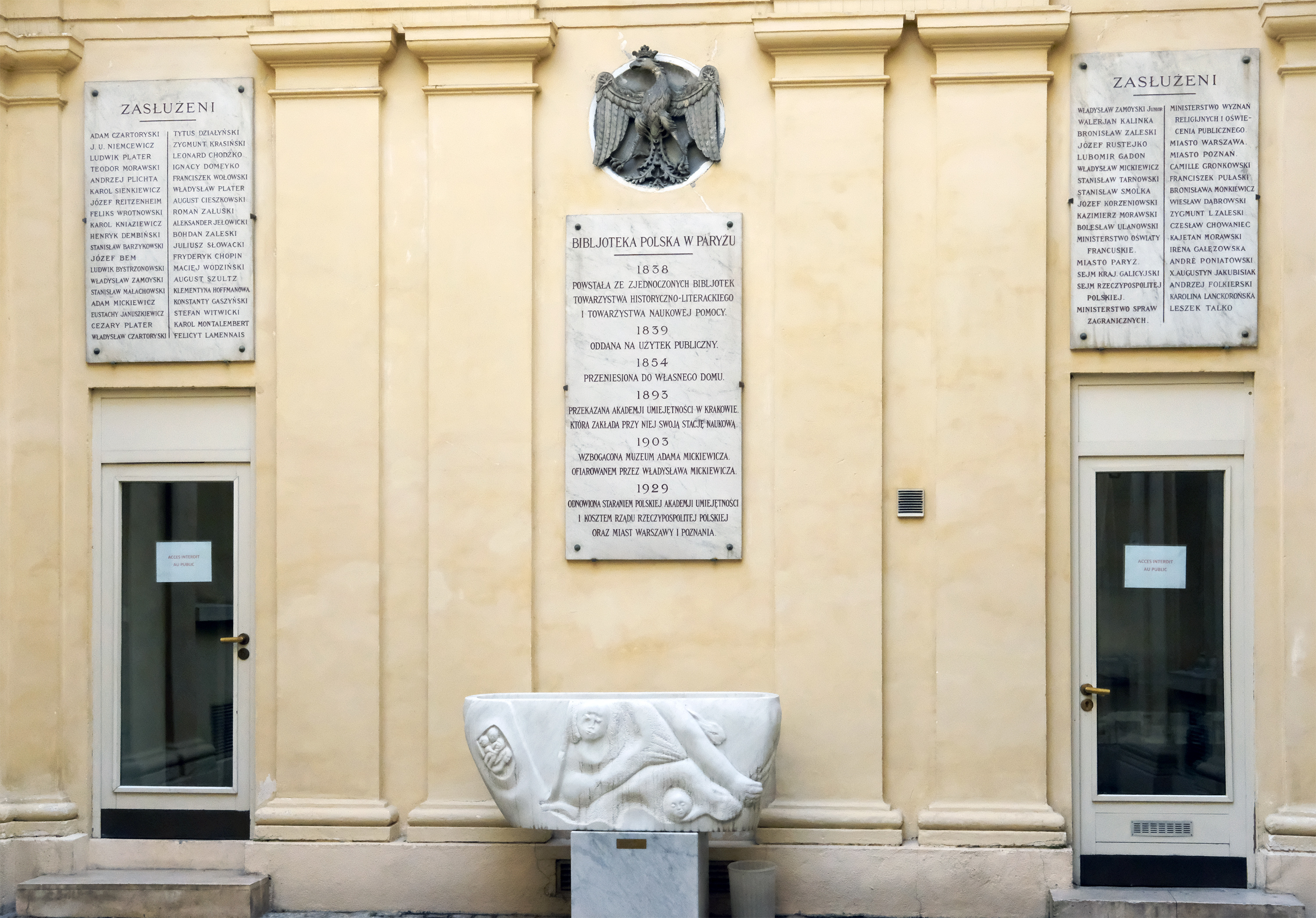 Quai d'Orléans (n°6 entrée de la bibliothèque polonaise) - Paris IV